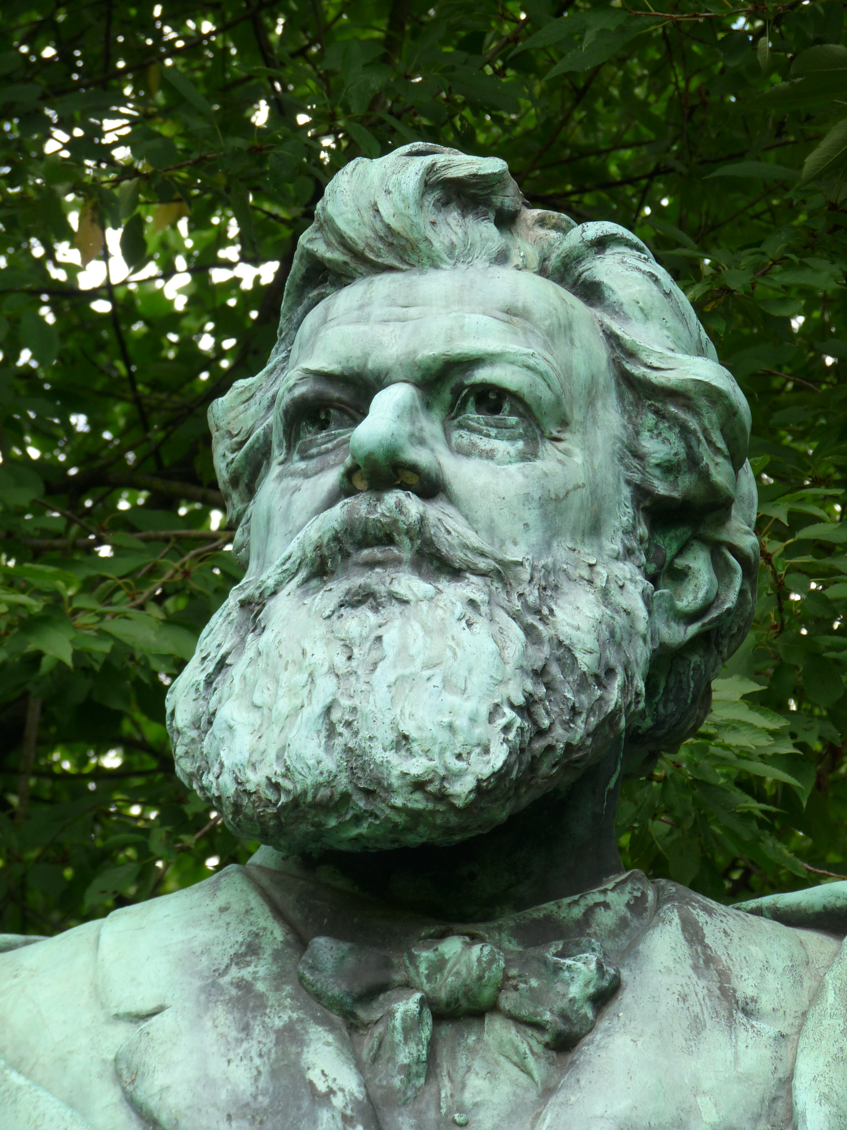 Monument Victor Nessler (Alfred Marzolff) au parc de l'Orangerie à Strasbourg